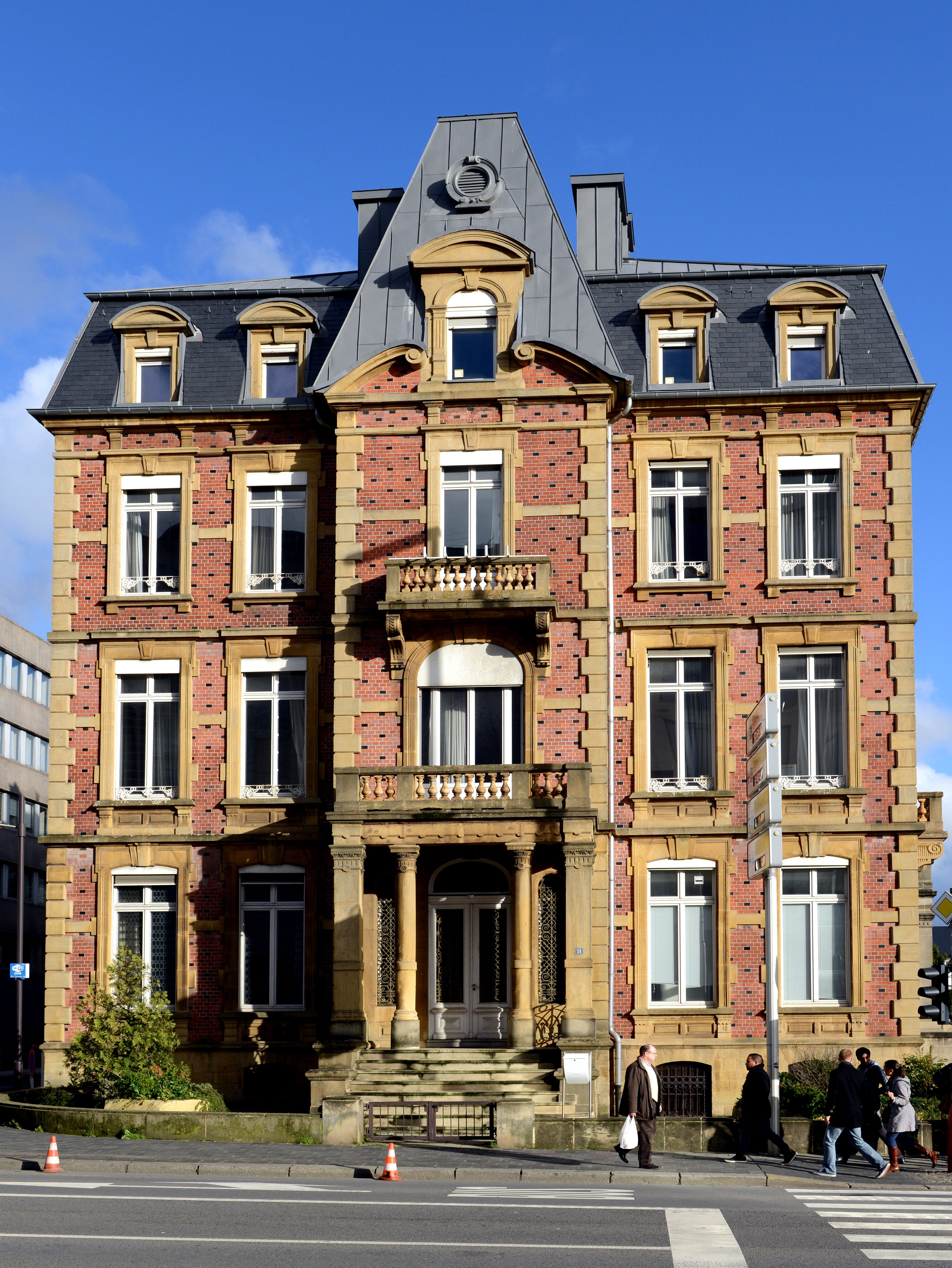 D'Maison Servais um Boulevard Royal, Eck Boulevard Roosevelt, ënner anerem bis 2011 Siège vun der ABBL, steet 2013 eidel do.